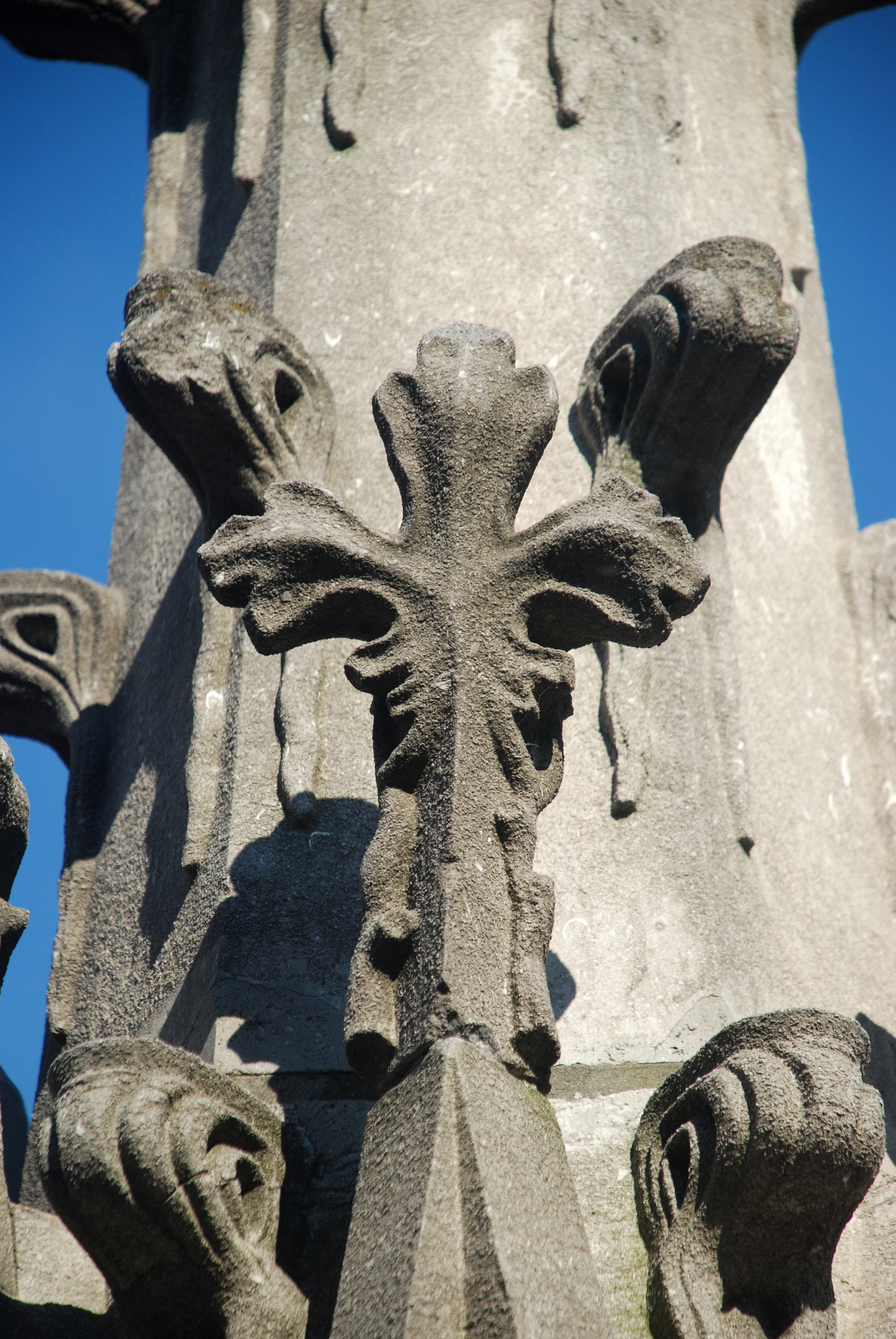 Belgique - Brabant wallon - Fontaine-perron de Nivelles